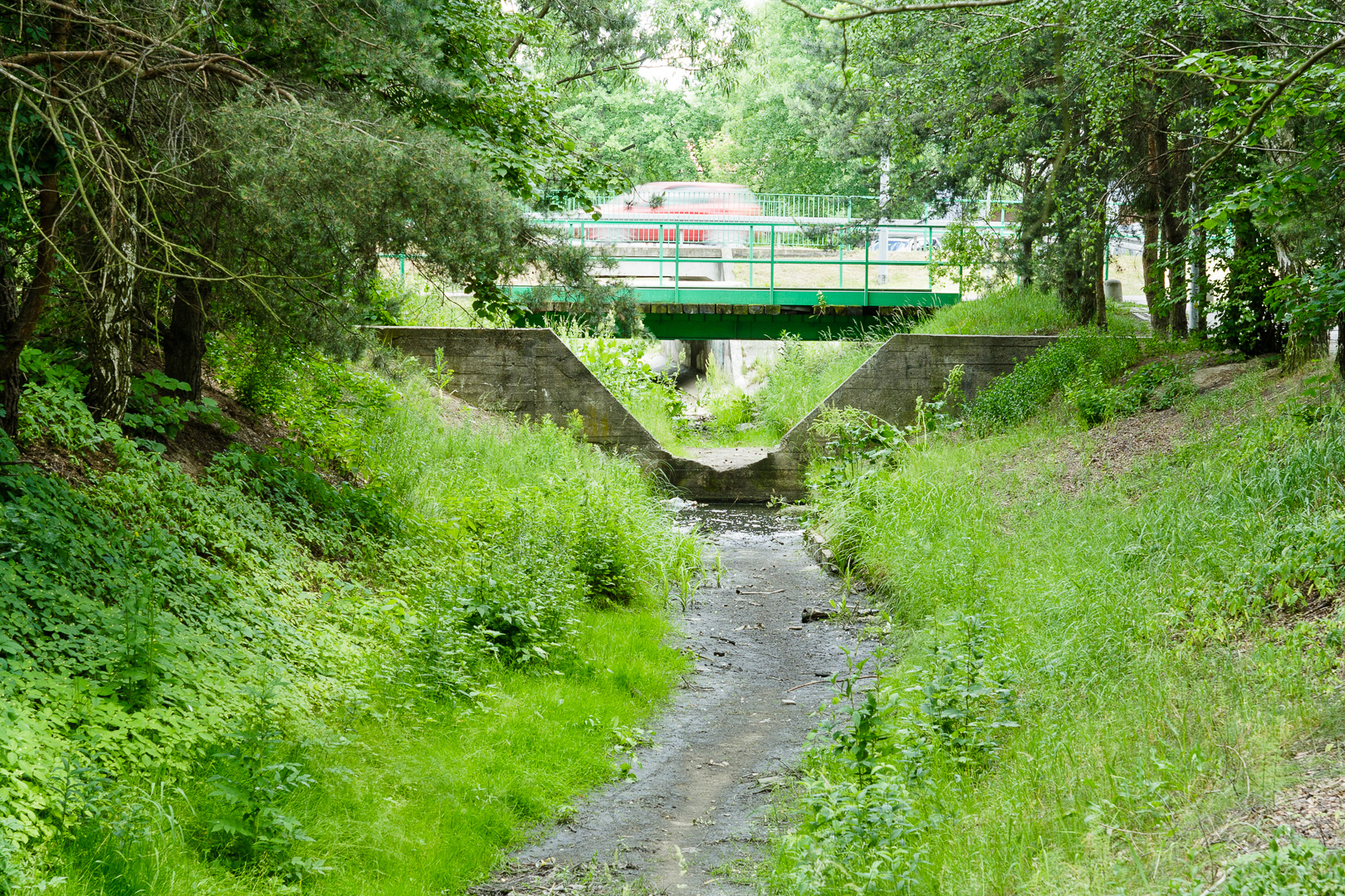 Kanał Wawerski - jaz stały z przelewem trapezowym, w głębi ulica Jana Pawła II. Stara Miłosna, Wesoła, Warszawa.